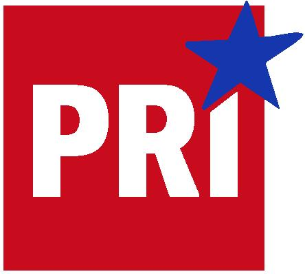 Logo Partido Regionalista de los Independientes